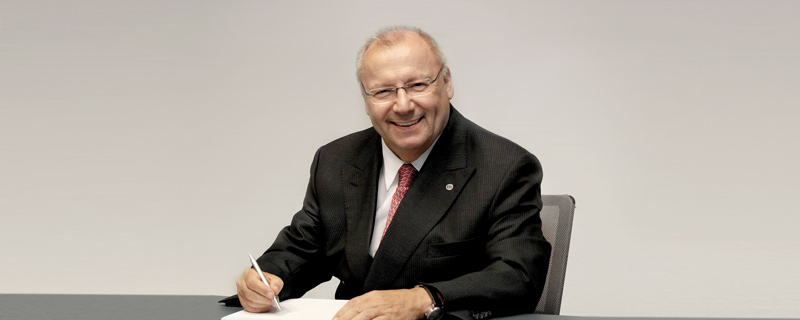 Franz-Josef Wernze